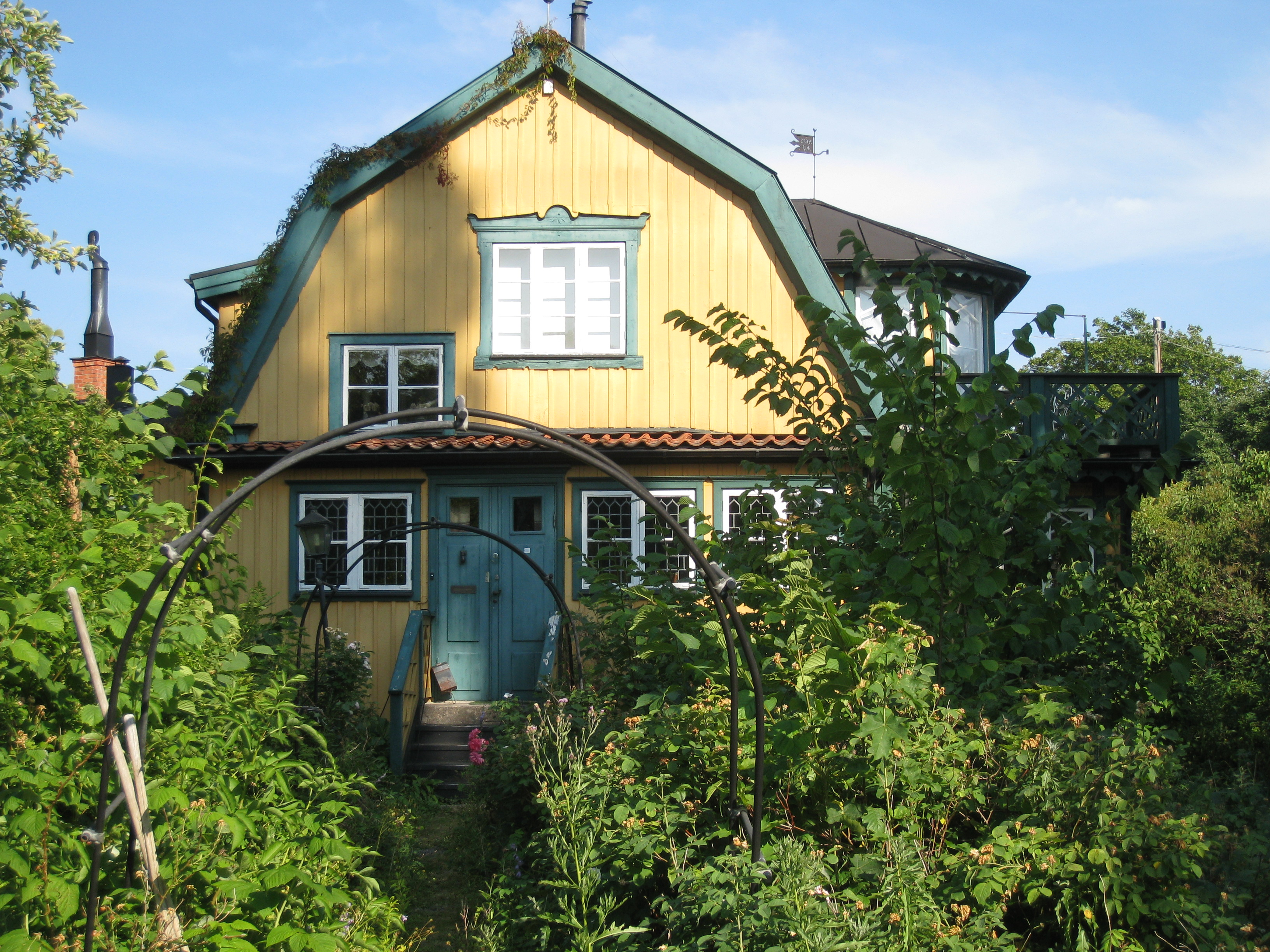 Kulan i Äppelviken i Bromma tillhör "Mälarstrandens sommarbebyggelse"."Villa Kulan", Äppelviksvägen 39, byggmästare Claes Berglund. Bostadshuset Kulan ligger i anslutning till sjövillorna men är infogat i stadsdelens kvartersstruktur.